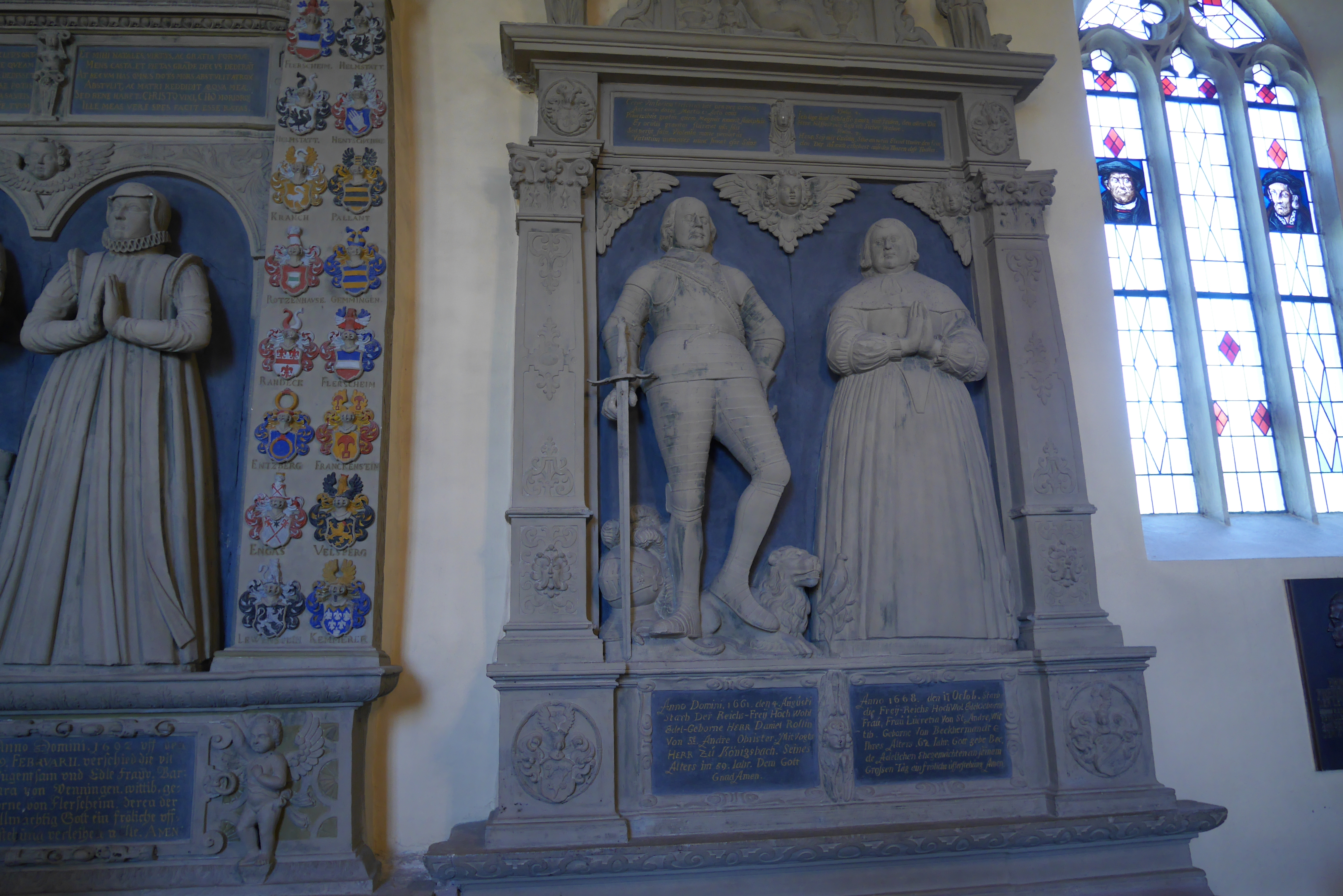 Glasmalereien mit den Portraits von „Martin Luther“ und „Philipp Melanchthon“. Epitaphien mit lebensgroßen Darstellungen der Patronatsherren Nordwand derer von St.André